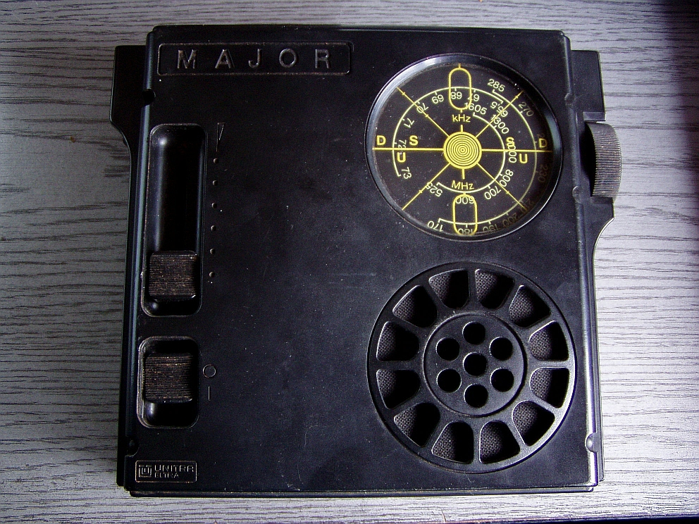 Radio Major MOT 759